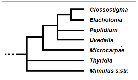 Microcarpeae_-_Cladogramma_della_tribù